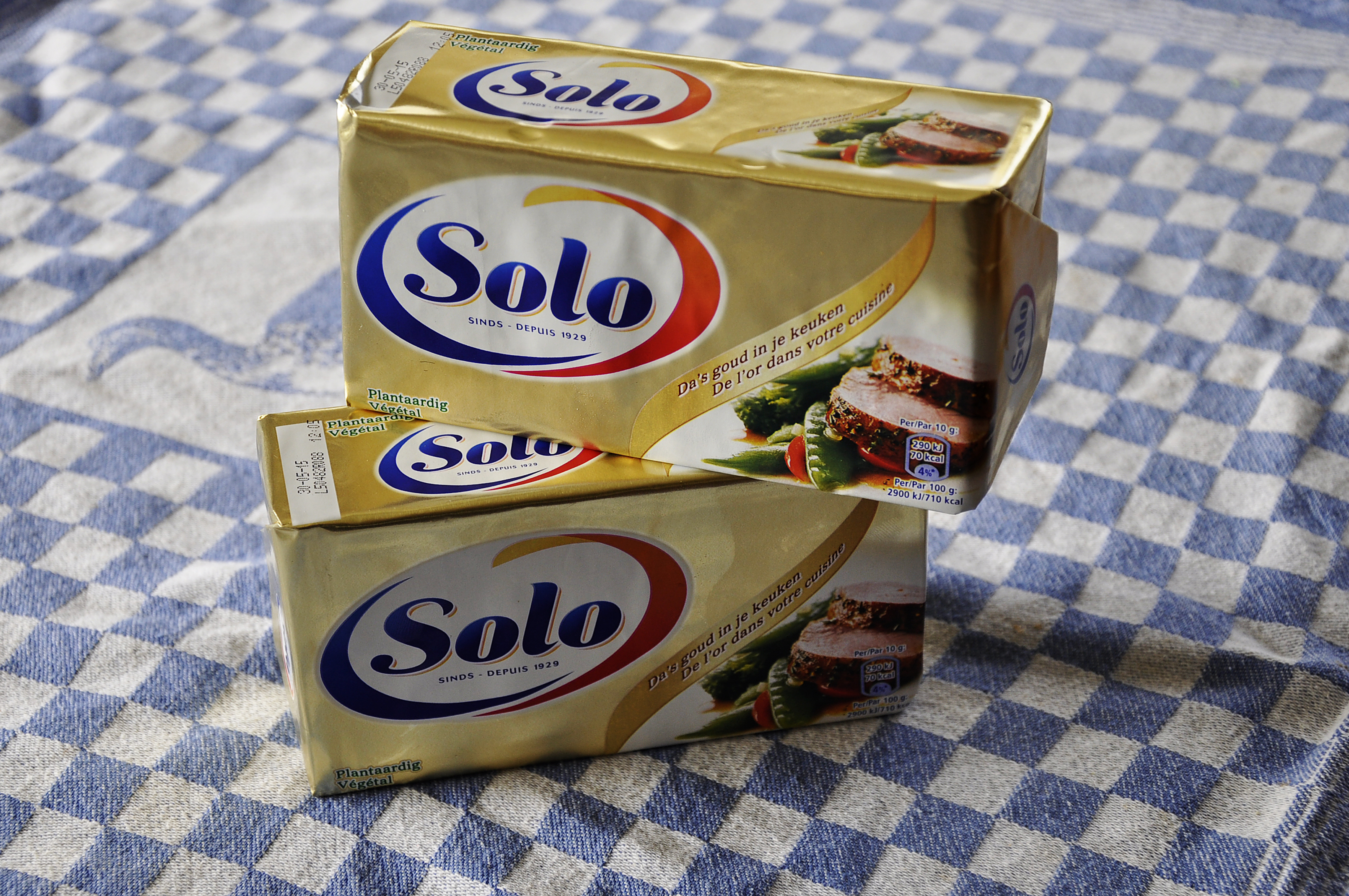 Twee pakjes Solo-margarine